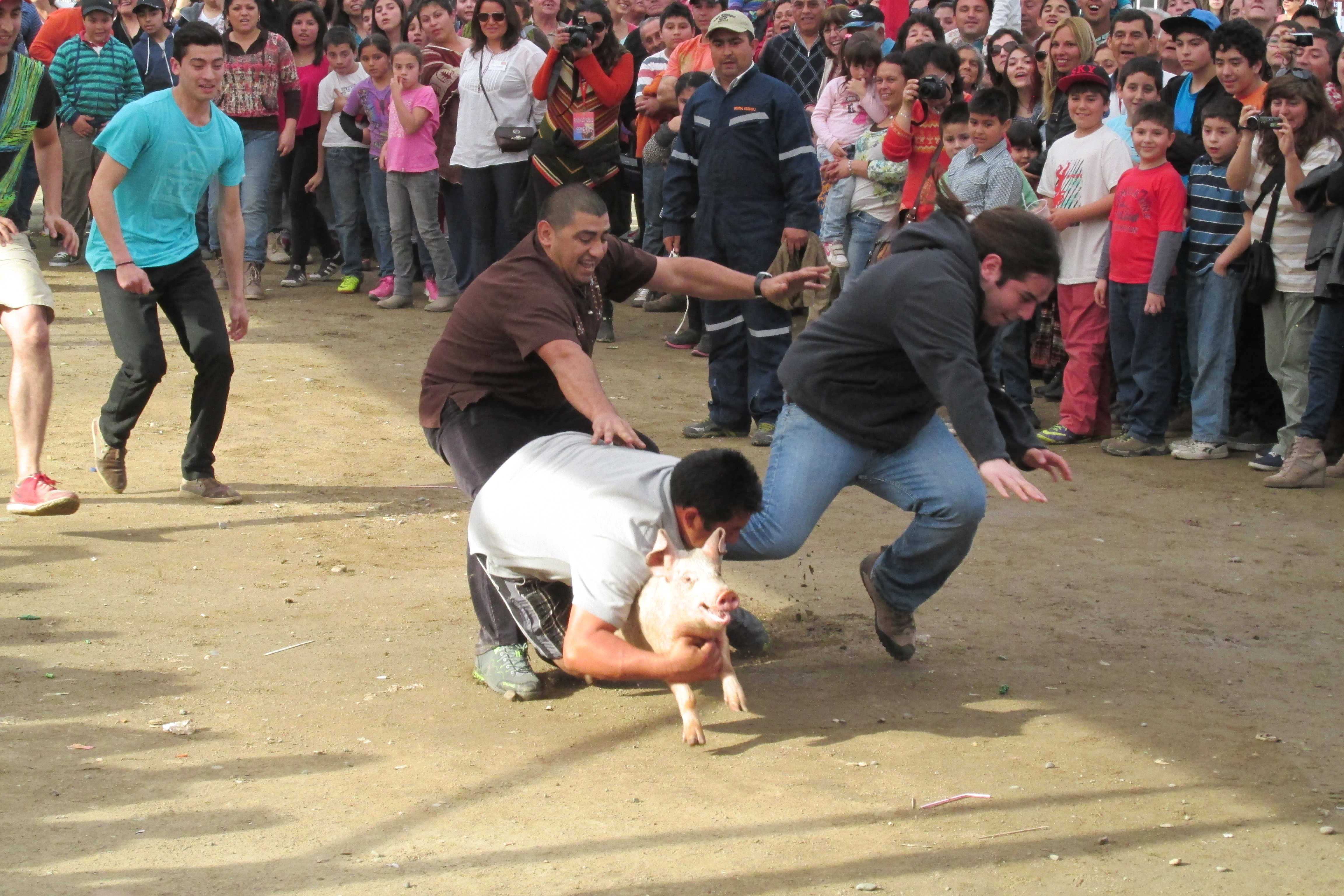 Persecución del Chancho, juego típico realizado en Fiestas Patrias de Chile